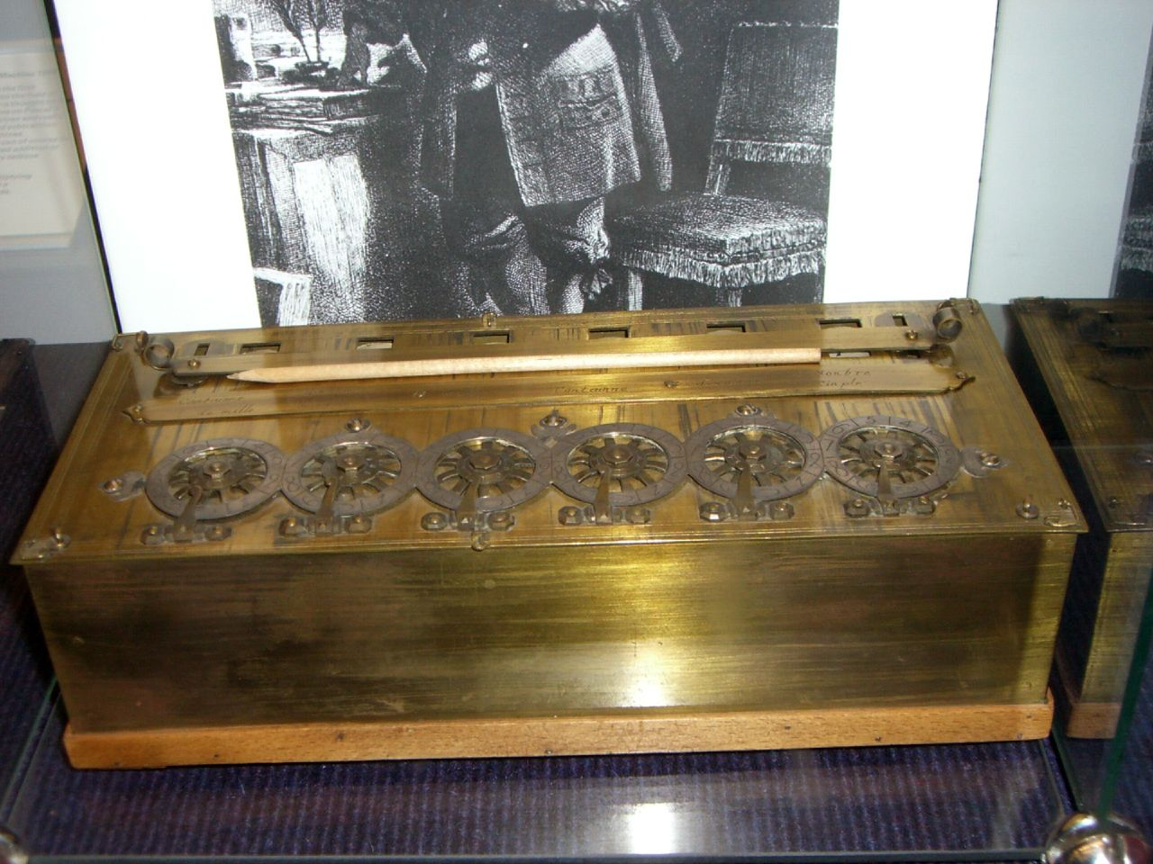 Pascaline